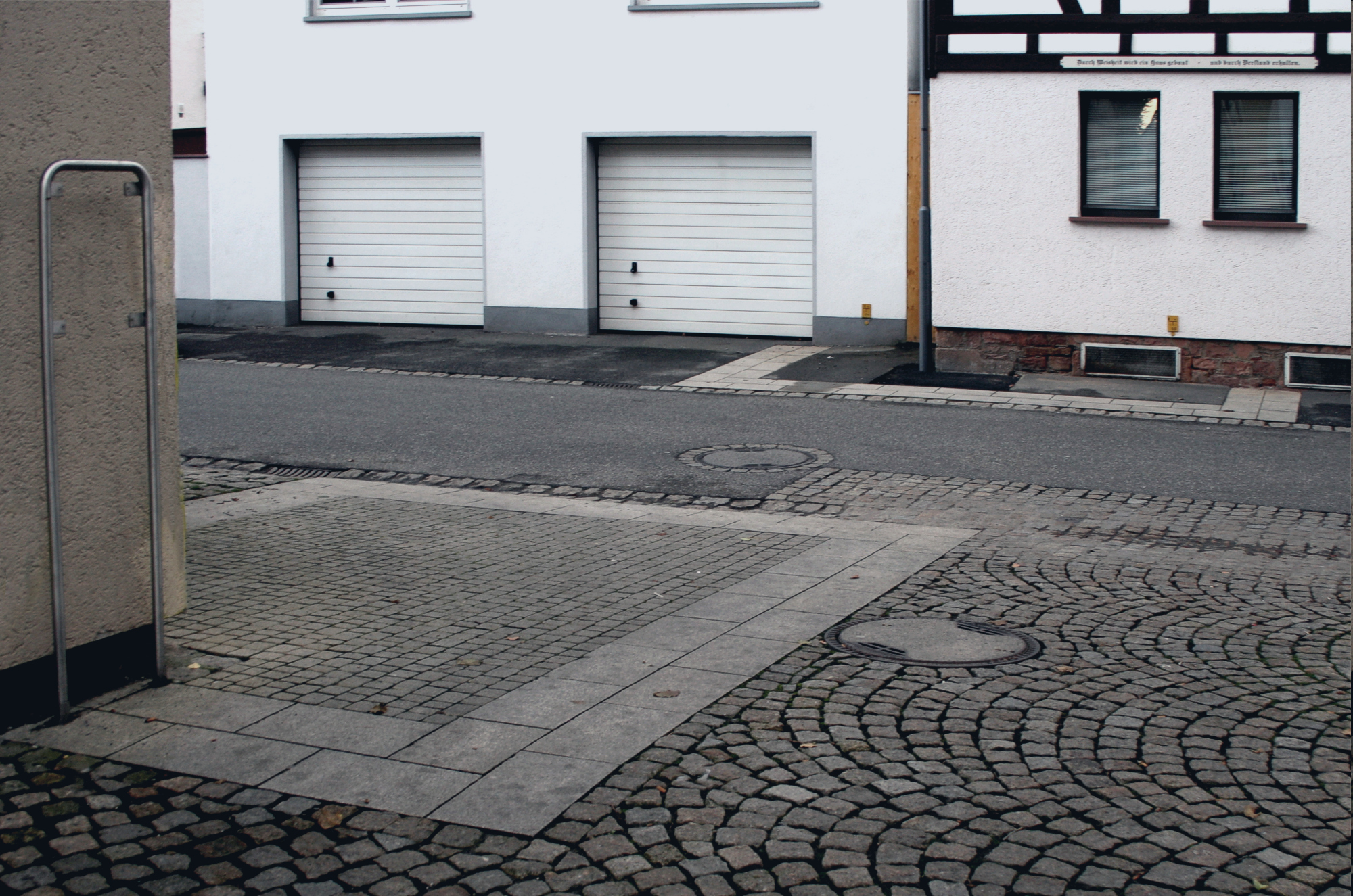 Lage des nördlichen Seitentores vom Kastell Niedernberg, im Straßenpflaster markiert.